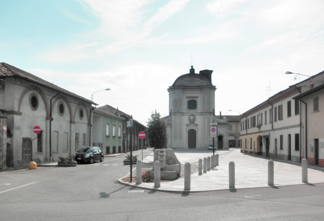 Piazza dei Caduti a Mairano, frazione di Casaletto Lodigiano.